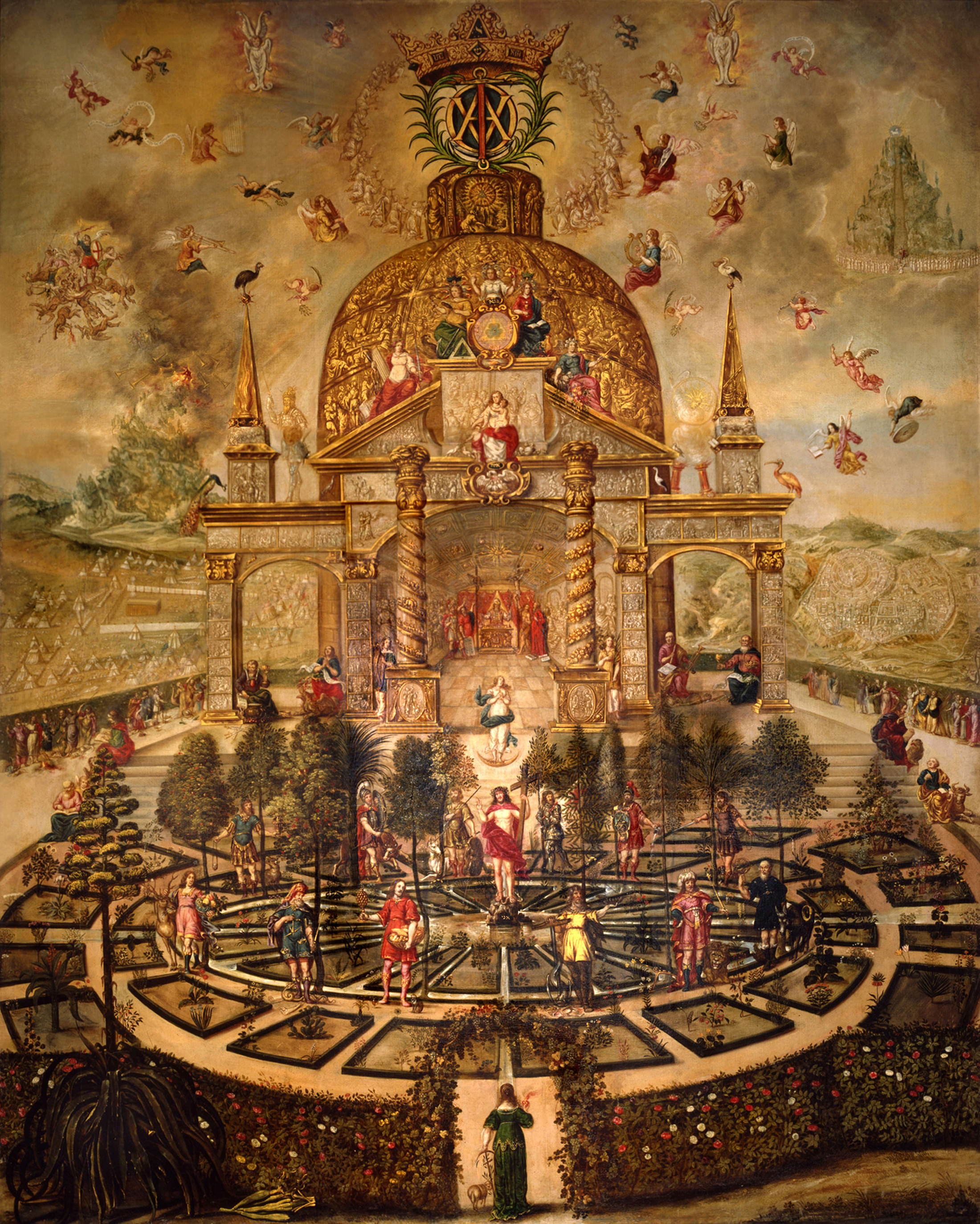 Schrein der kabbalistische Lehrtafel in Bad Teinach